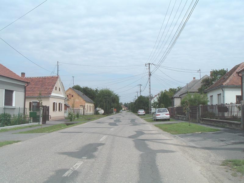 Street in Szentpéterfa, Hungary